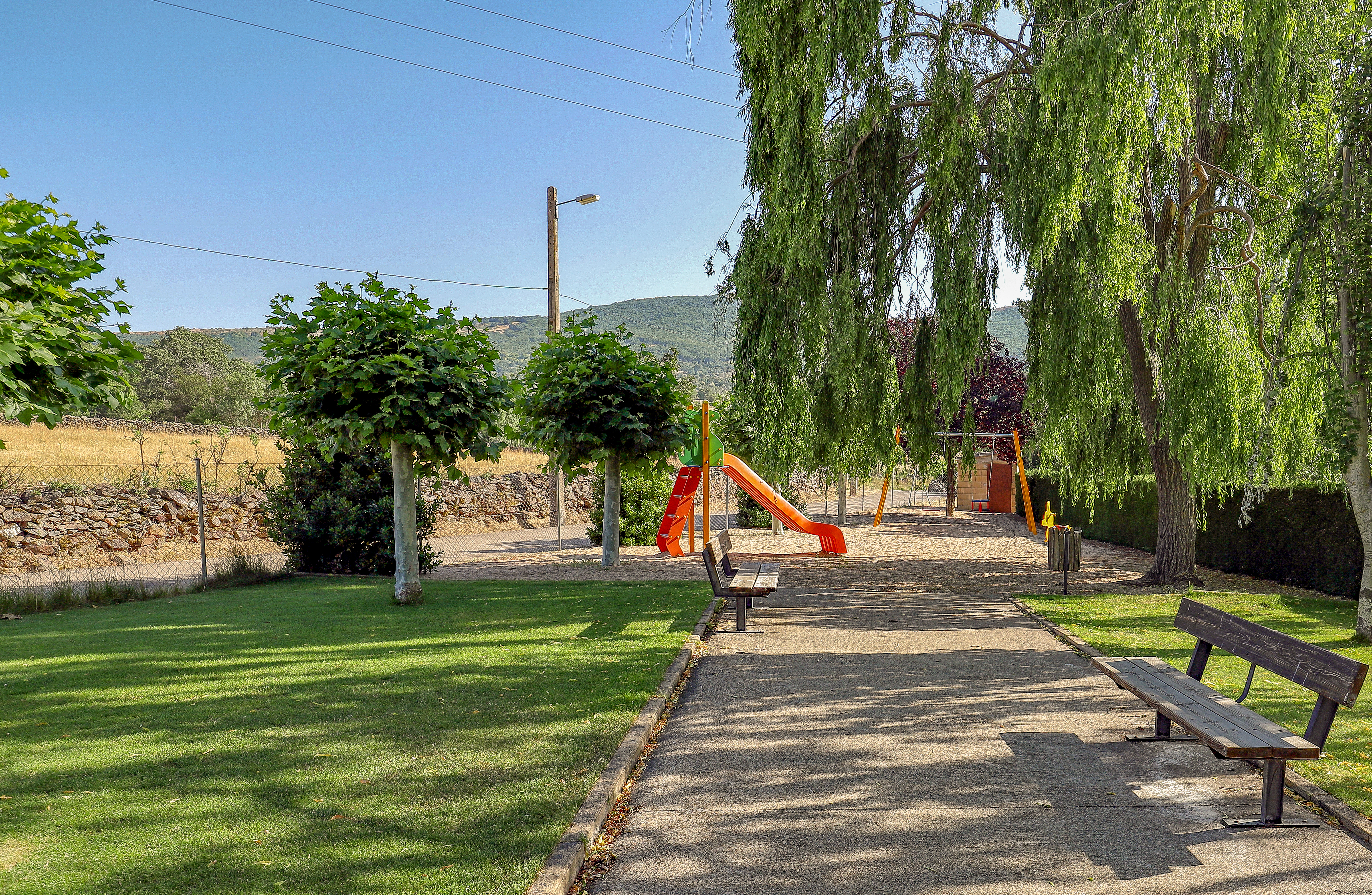 La Rinconada de la Sierra es un municipio de la comarca Sierra de Francia-Quilamas, provincia de Salamanca